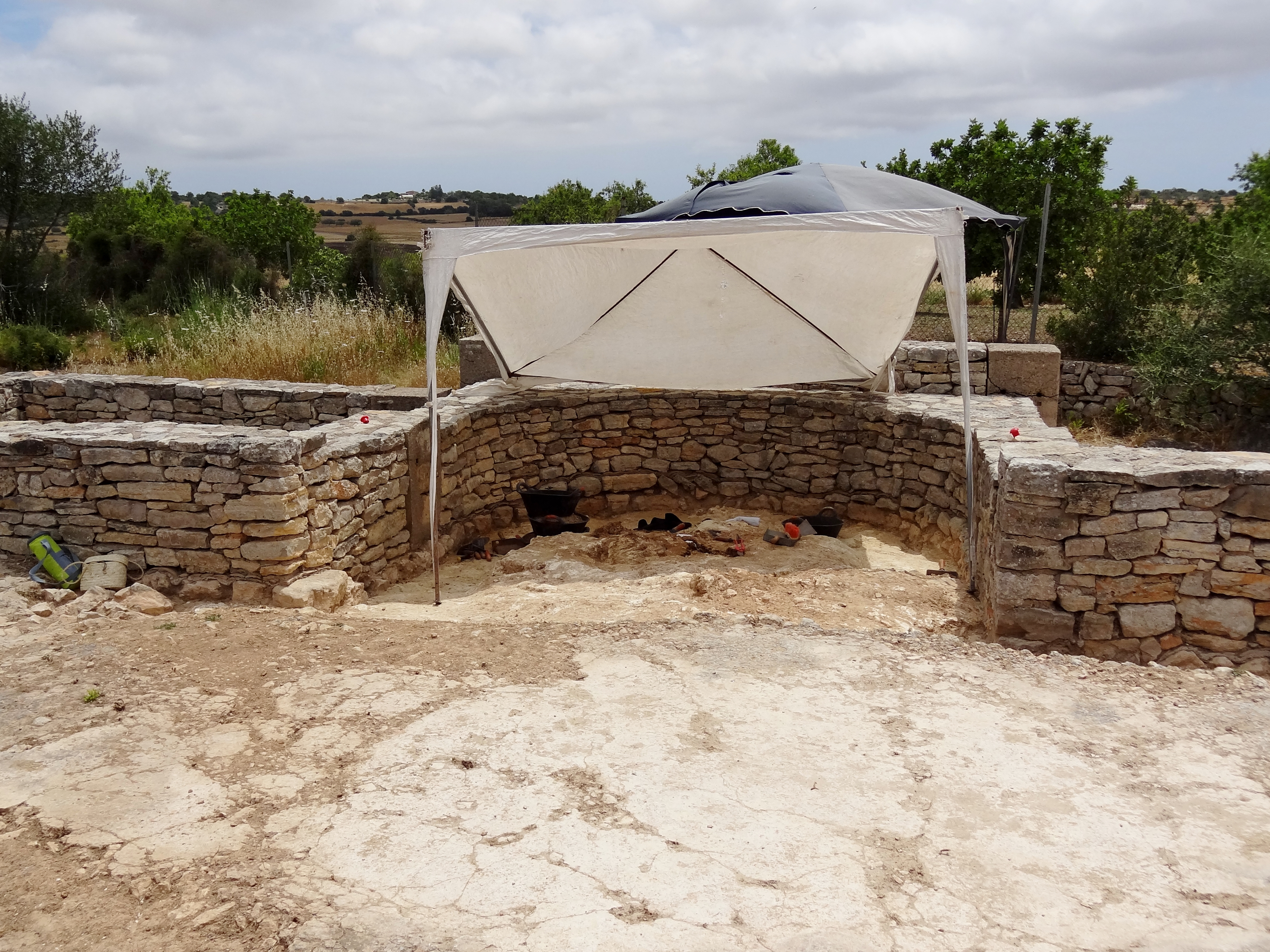 Ausgrabungsstätte der Basílica de Son Peretó, Gemeinde Manacor, Mallorca, Spanien